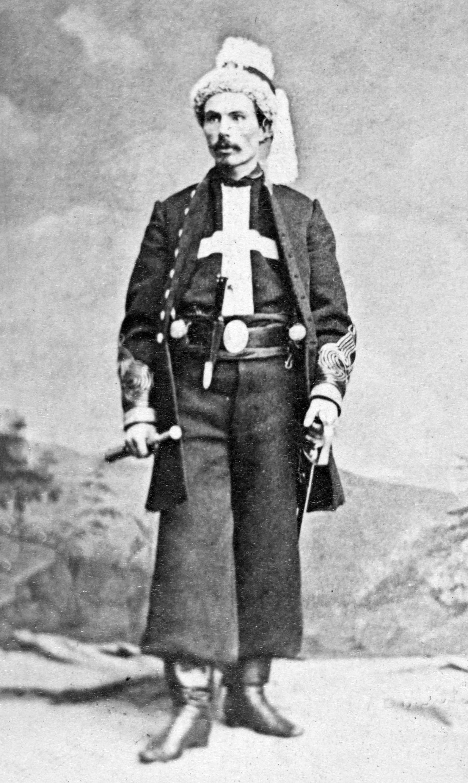 François Rochebrune, Franciszek de Rochebrune (ur. 1 czerwca 1830, zm. 19 listopada 1870) – French soldier, Polish general.